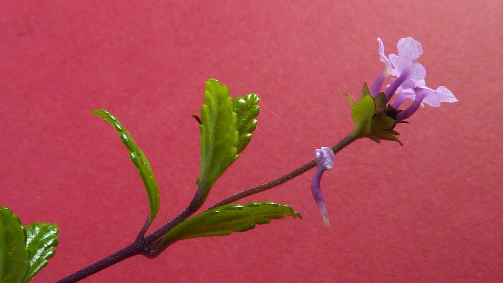 Popovkin 715 (HUEFS)